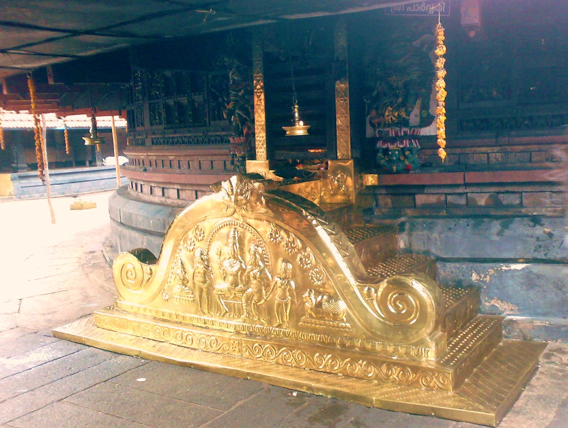 വാഴപ്പള്ളിക്ഷേത്രം പാര്‍വ്വതീ ശ്രീകോവില്‍